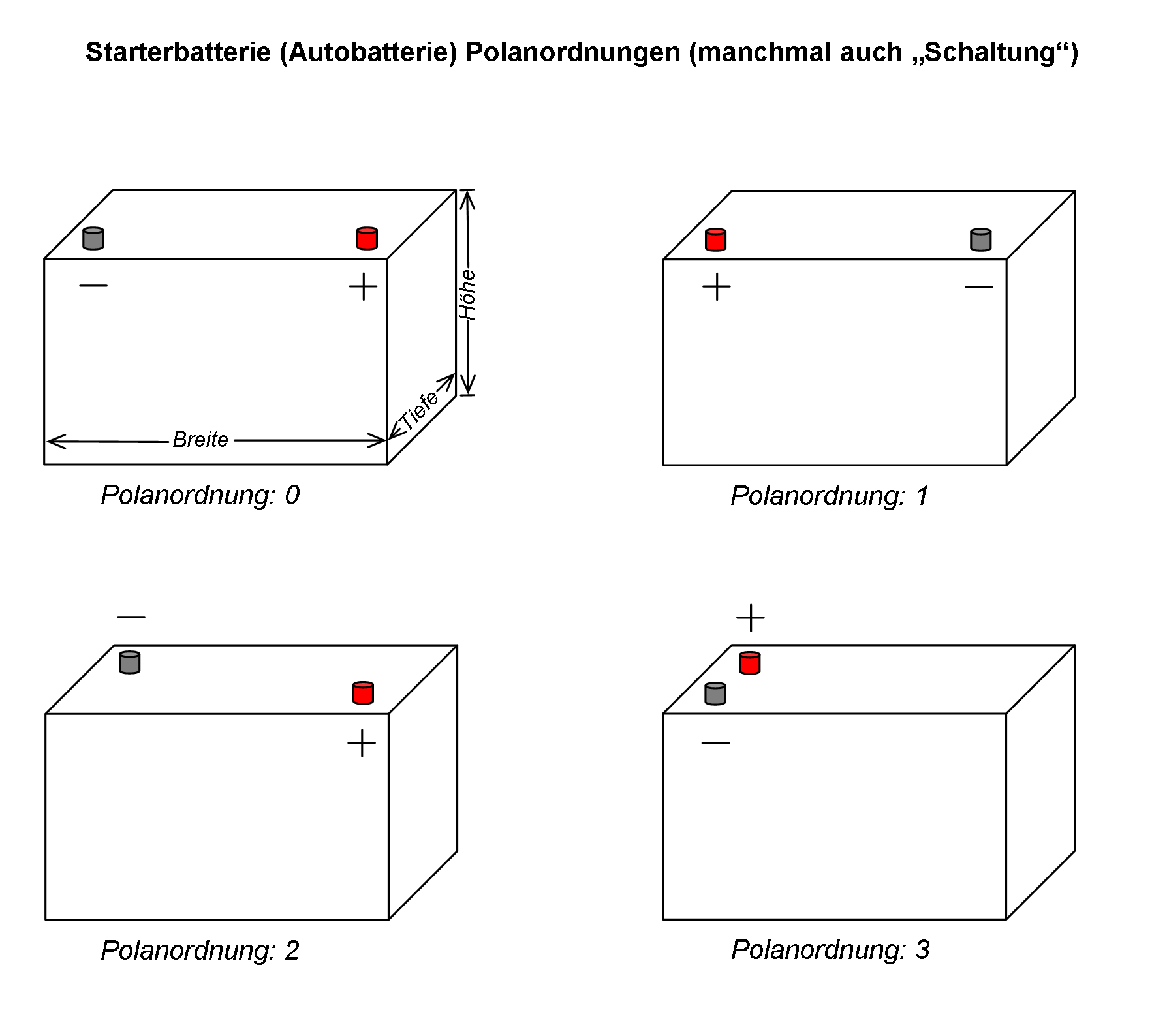 Polanordnungen auf Starterbatterien (German)